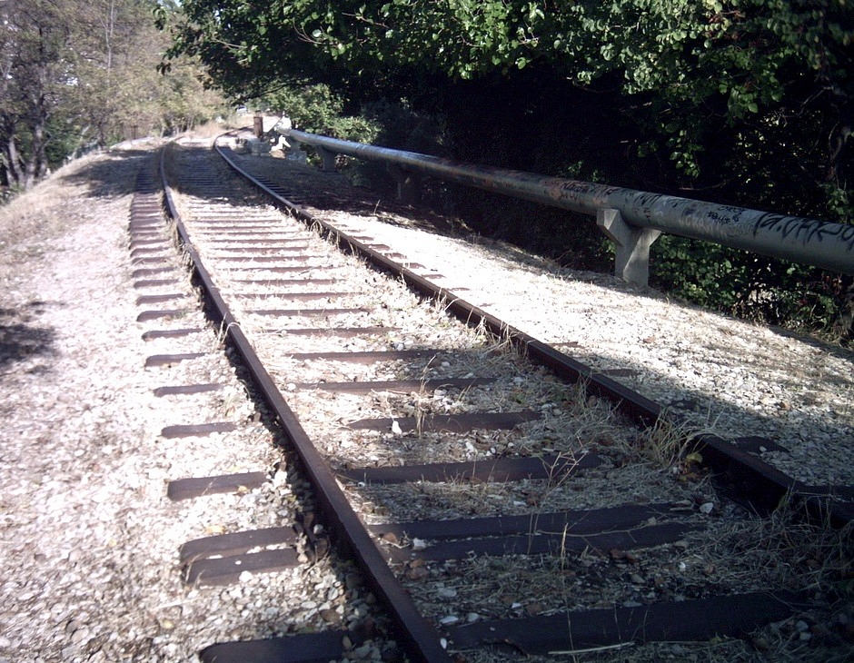 La ligne Aubagne - Fuveau près de Roquevaire, actuellement inutilisée. Noter les traverses métalliques, prévues pour supporter des trains lourds, ainsi que la conduite transportant les boues rouges de l'usine d'alumine Alteo de Gardanne à Cassis.